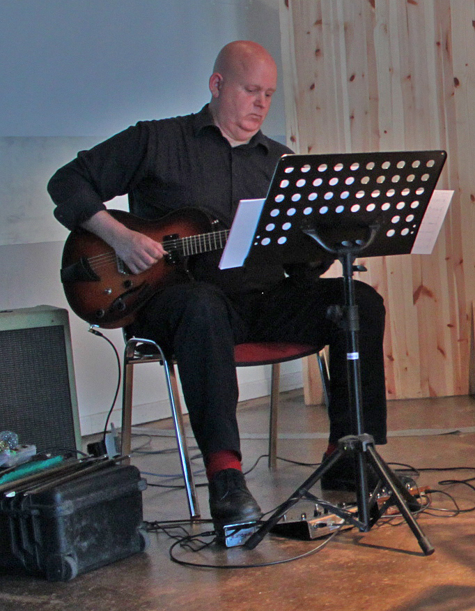 Scott Fields bei einem Konzert im Kölner Loft 2012